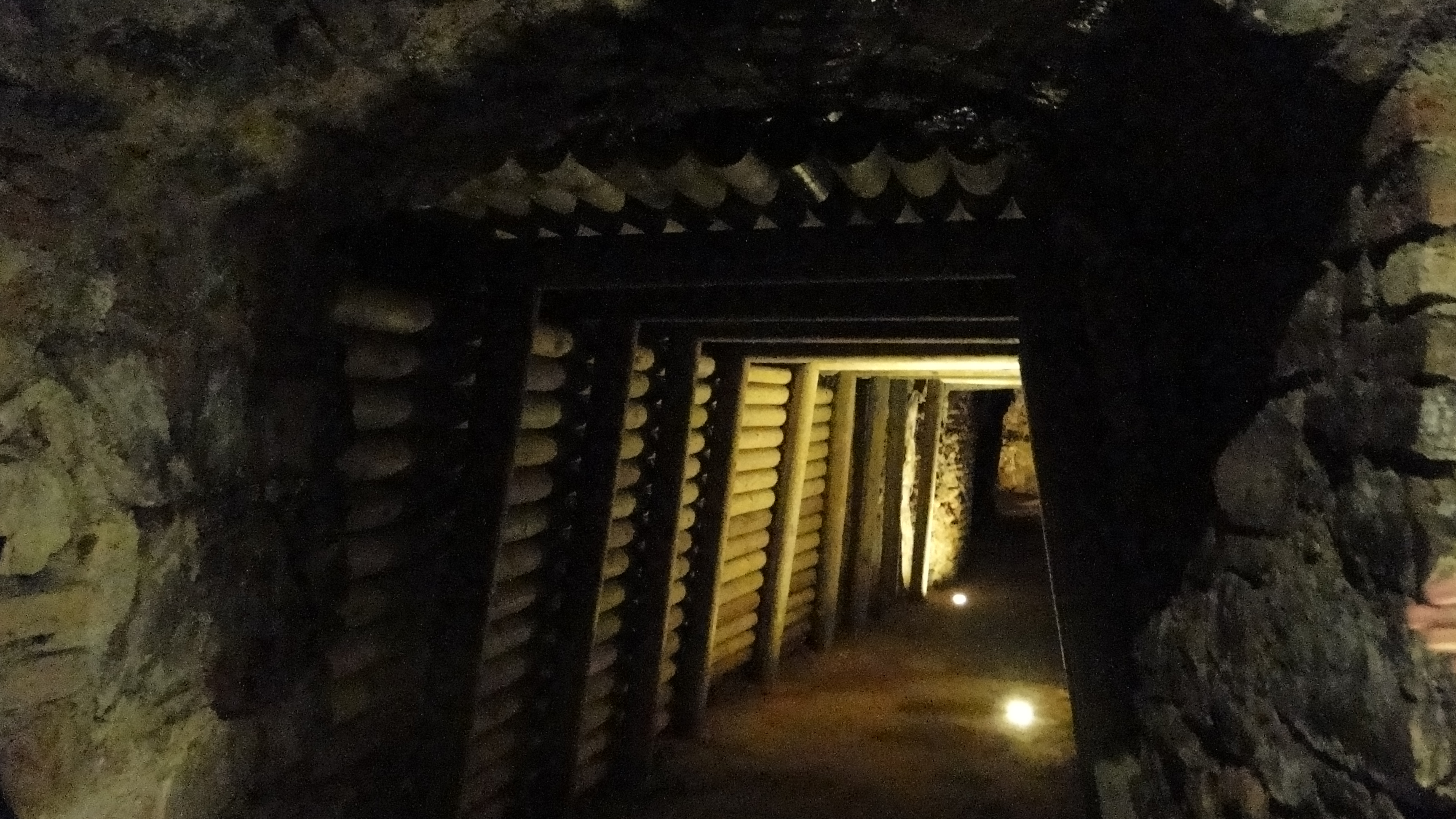 Mina de Mercurio. Almadén (Ciudad Real). Patrimonio de la Humanidad